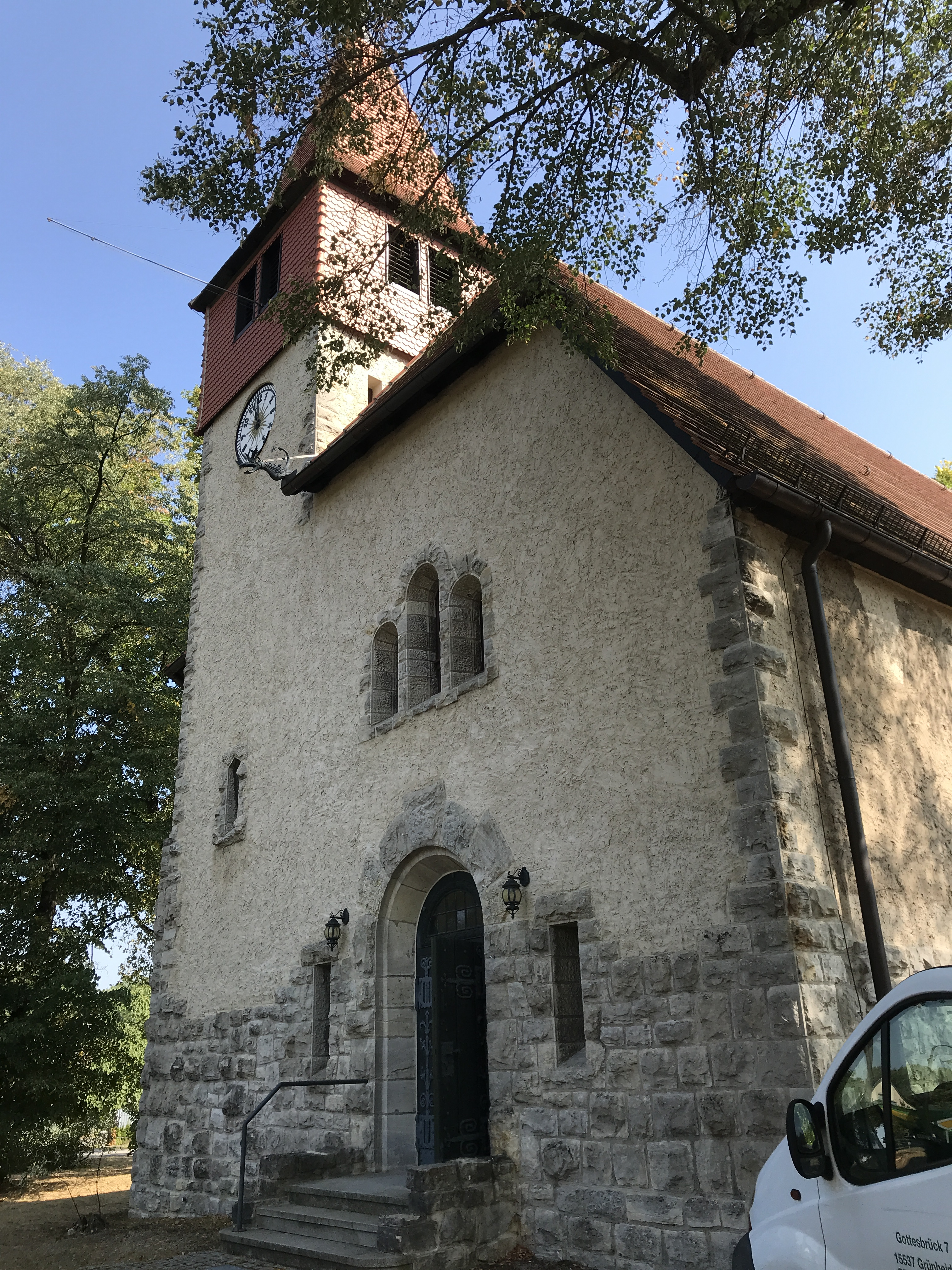 Die Dorfkirche in Kienbaum der Gemeinde Grünheide (Mark) in Brandenburg entstand in den Jahren 1908 und 1909. Im Innern steht unter anderem ein Kanzelaltar aus dem 18. Jahrhundert.